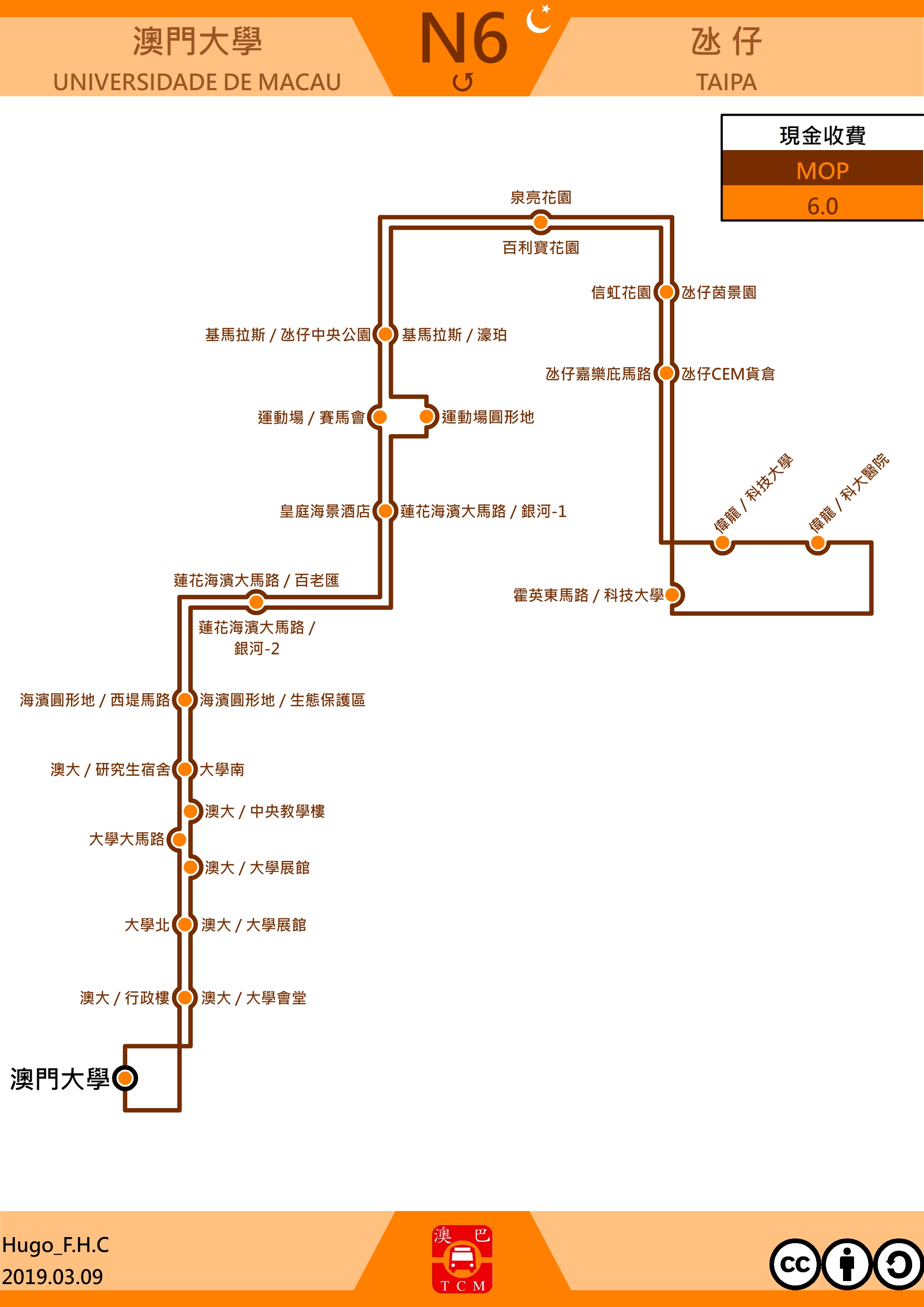 澳門巴士N6走線圖